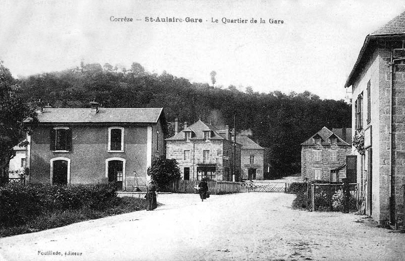 Le bâtiment voyageurs et le passage à niveau de la gare de Saint-Aulaire en Corrèze.